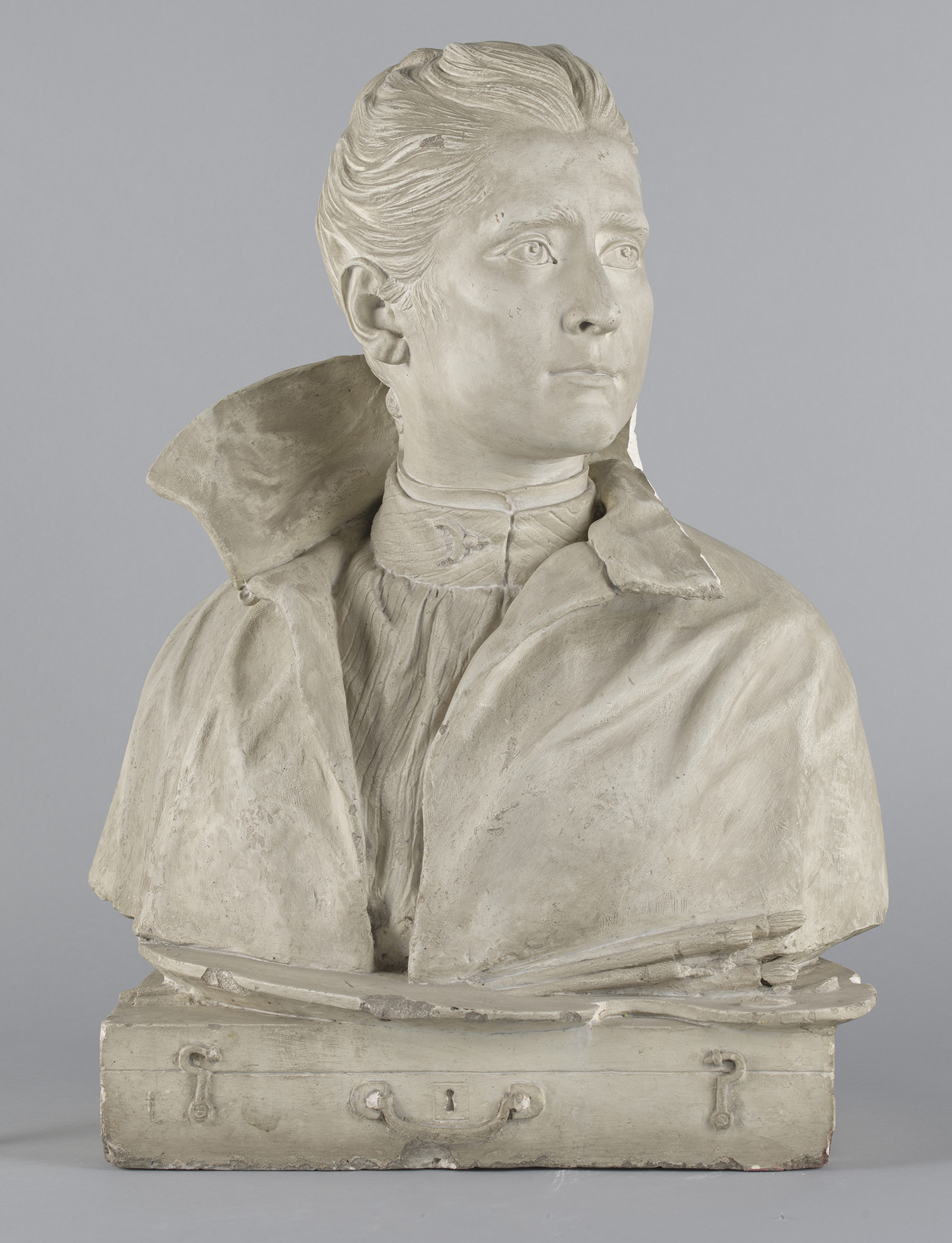 1Cámara:MAMIYA RB67 Pro SD / Back digital LEAF APTUS II 62Objetivo:Mamiya KL 90mm f/3.5L3Tubo(s) de extensión:No4Distancia Focal:90mm5Apertura:f/ 116Tiempo de exposición:125s7ISO:1008Filtro(s):Marca: No Aplica Tipo: No aplica Modelo:9Fuente de Iluminación-Radiación:Cantidad:2Tipo: Comet10Potencia Flash:1/2+511Fondo:Gris Oscuro12Tarjeta de referencia:AIC mediana13Distancia cámara-objeto:0,00m14Distancia Fuente de iluminación-Objeto:130m15Angulo Fuente de iluminación-Objeto:45 º16Notas:+pantalla blanca frontal izquierdo